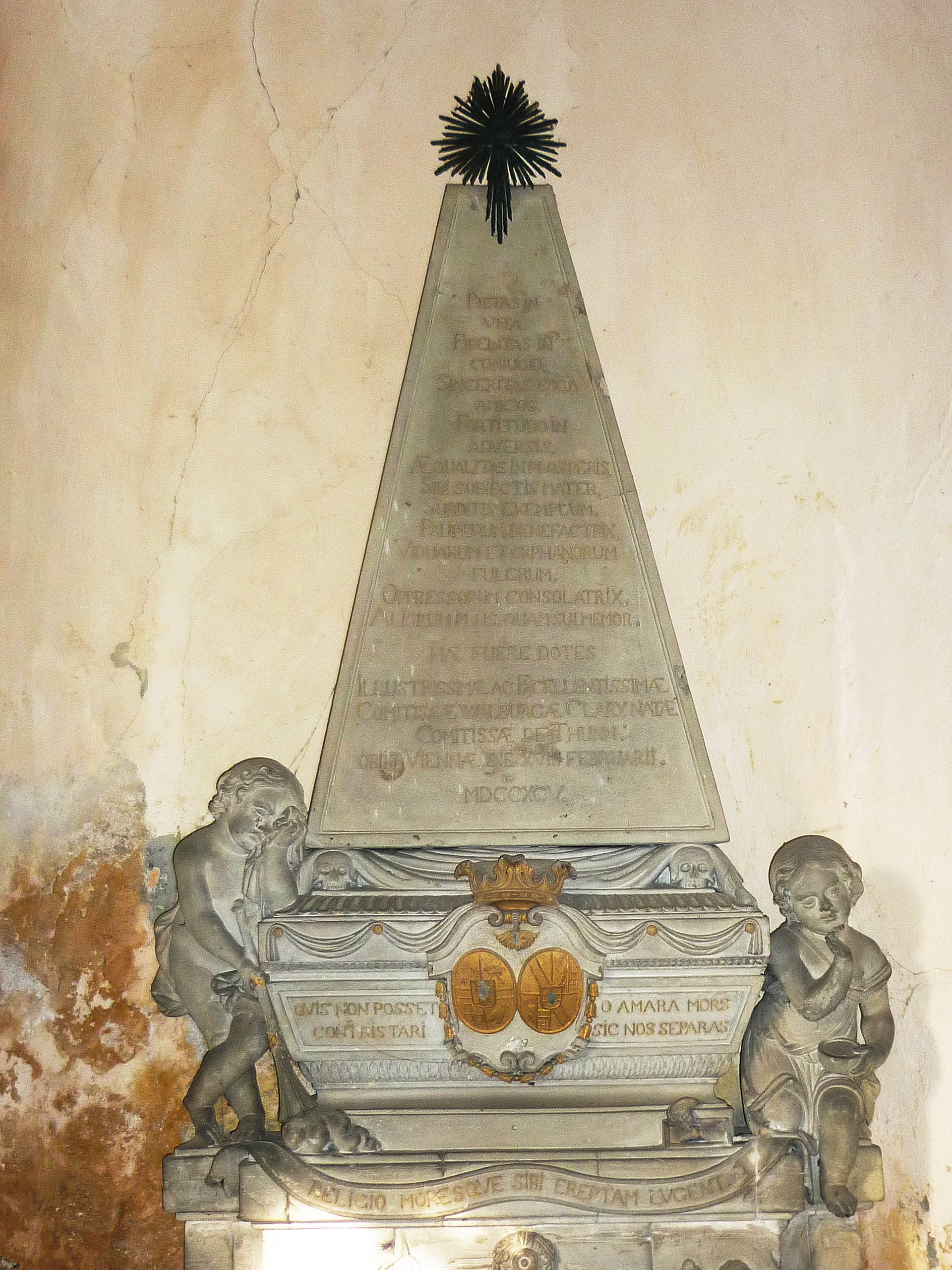 Grabmal für Maria Walburga Josepha, Gräfin von Thun und Hohenstein (* 01.09.1743 Prag; † 18.02.1795 Wien), Ehefrau des Leopold Kaspar, Graf von Clary und Aldringen (* 02.01.1736 Prag; † 23.11.1800 Wien) mit Wappen Clary-Aldringen und Thun-Hohenstein in der Gruftkapelle der Pfarrkirche in Liebeschitz (Liběšice)